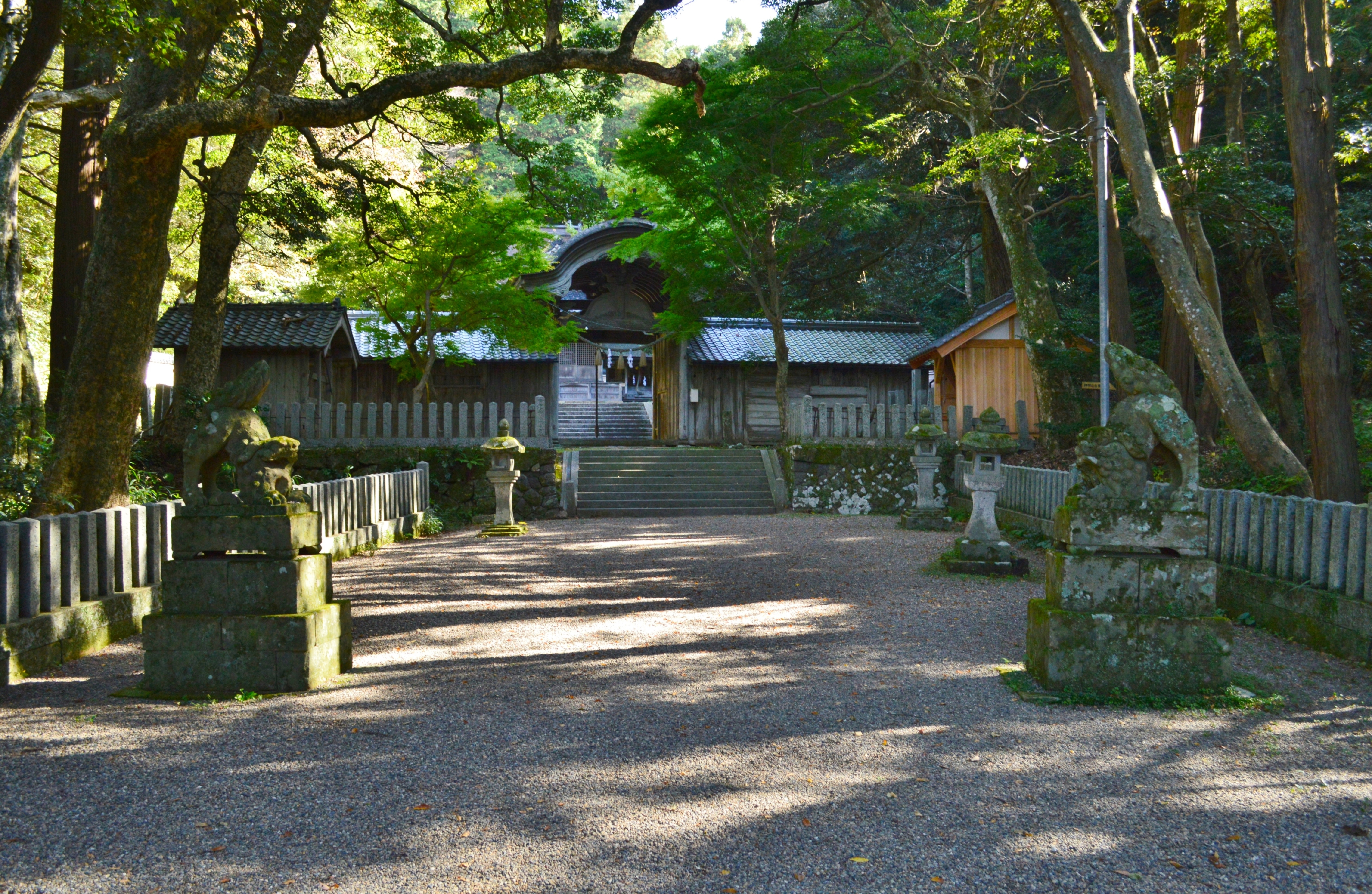 竹野神社 (京丹後市丹後町宮) 参道